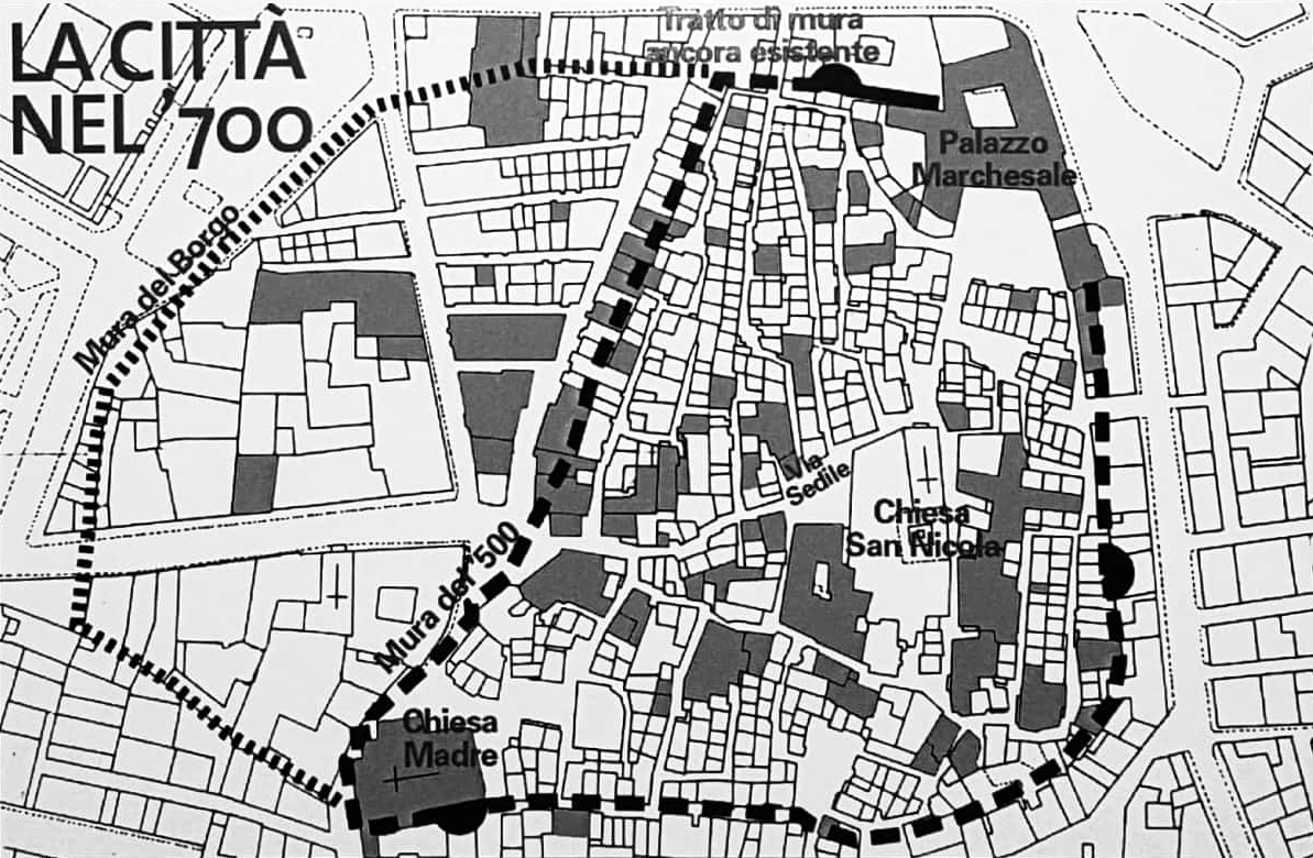 Piantina del centro storico di Turi e confronto con l'estensione del paese nel 1700.